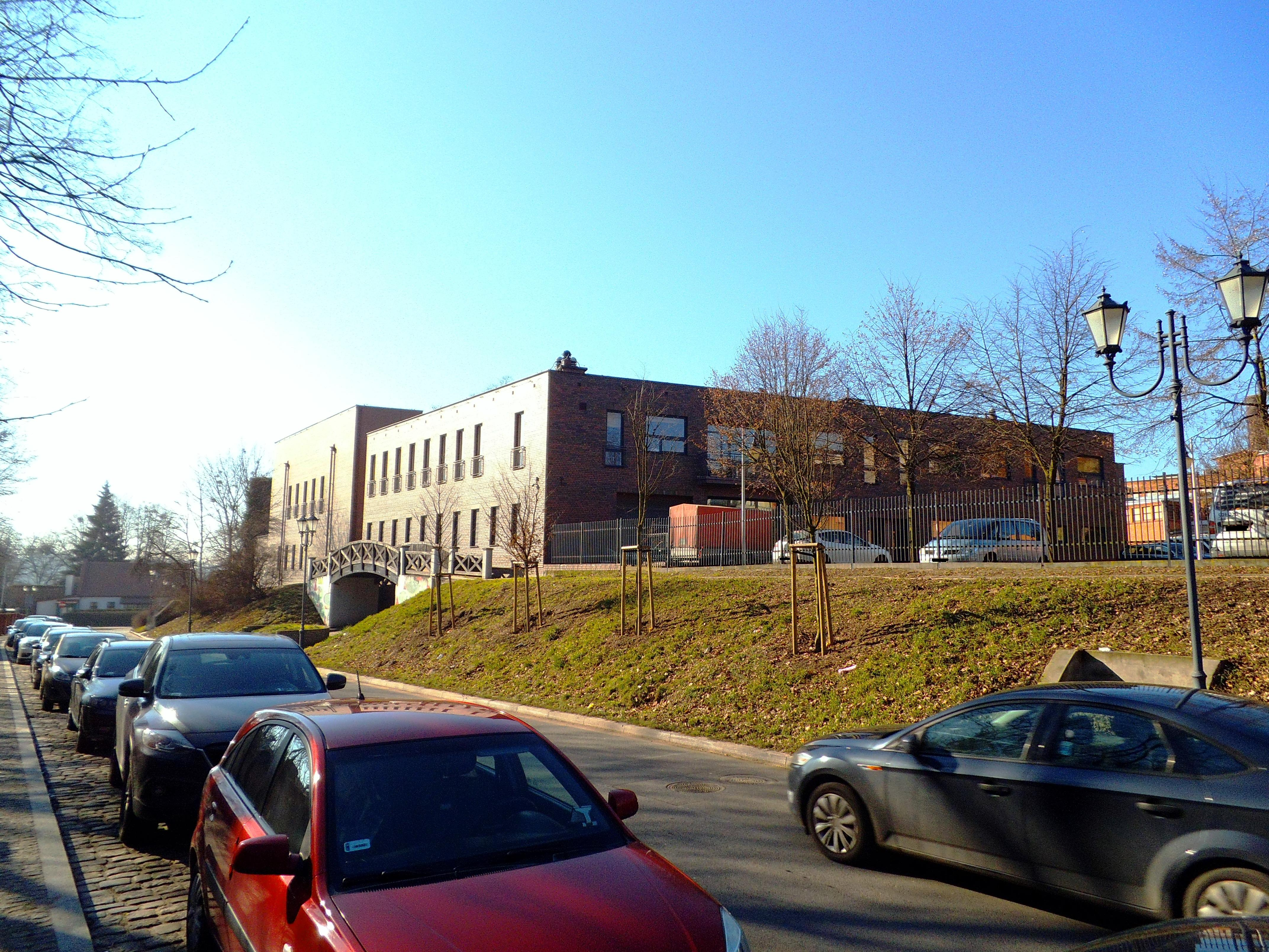 Ulica Wola Zamkowa w Toruniu22